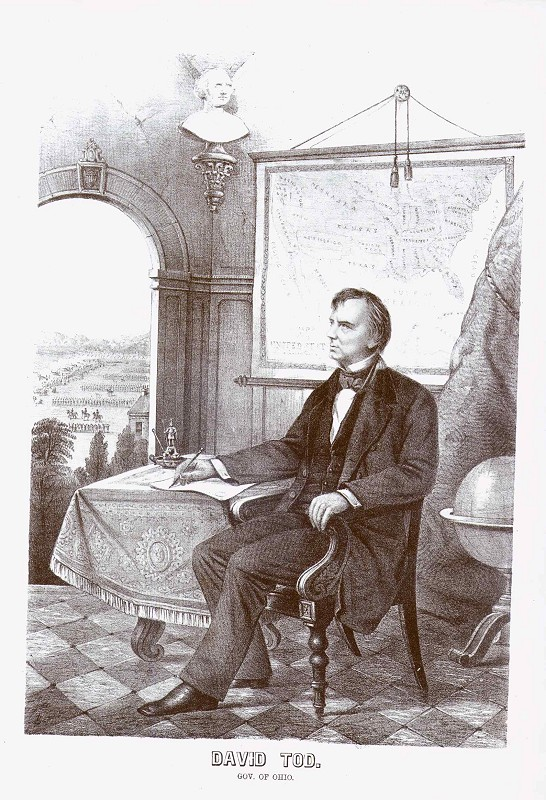 David Tod